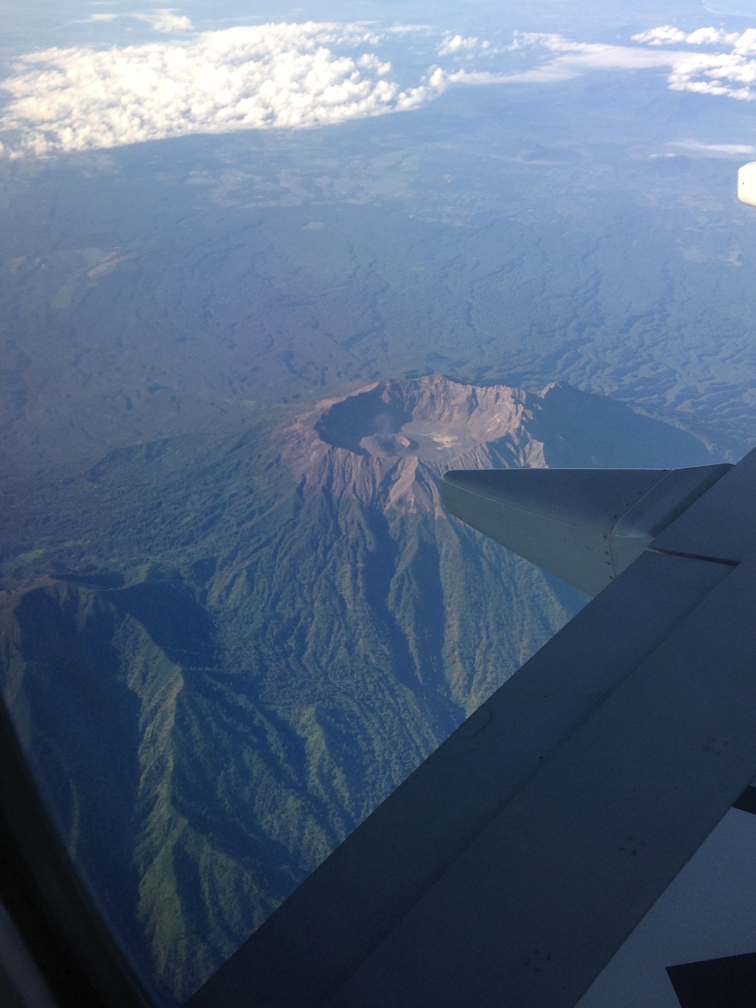 Gunung Raung Merupakan Gunung berapi yang terletak di Kabupaten Banyuwangi Provinsi Jawa Timur, Gunung ini memilki kesamaan sisa kaldera seperti gunung tambora yang terletak di Provinsi Nusa Tenggara Barat. Sehingga memungkinkan memiliki letusan yang amat dasyat.